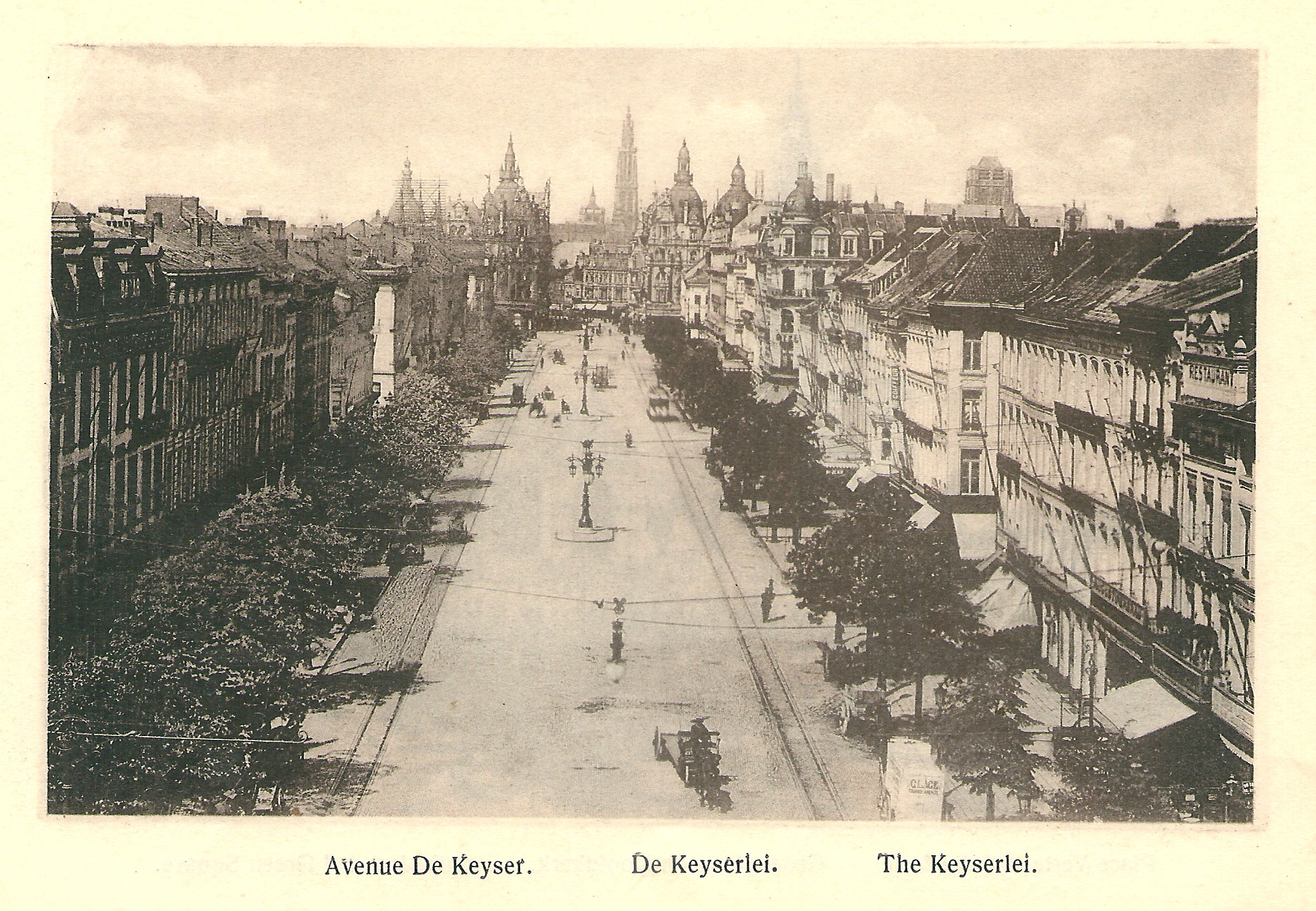 photographie légendée d'Anvers vers 1920 : Avenue De Keyser